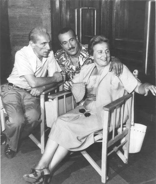 I fratelli De Filippo Foto scattata in Italia oltre 20 anni fa a copyright scaduto Licensing Categoria:Immagini di Eduardo De Filippo Categoria:Immagini di Peppino De Filippo